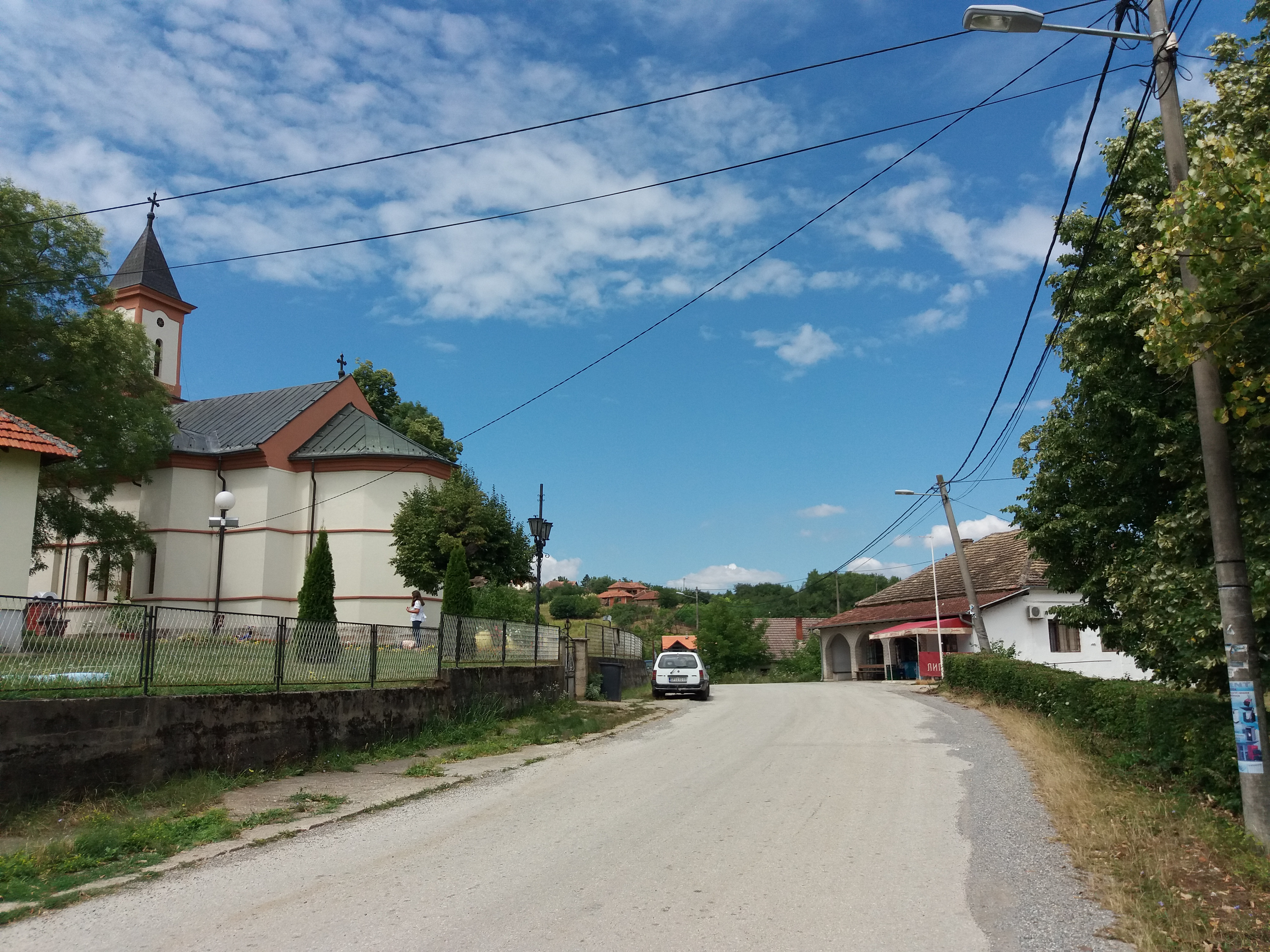 Srpski (latinica): Crkva Svetog Arhangela Gavrila, Baničina